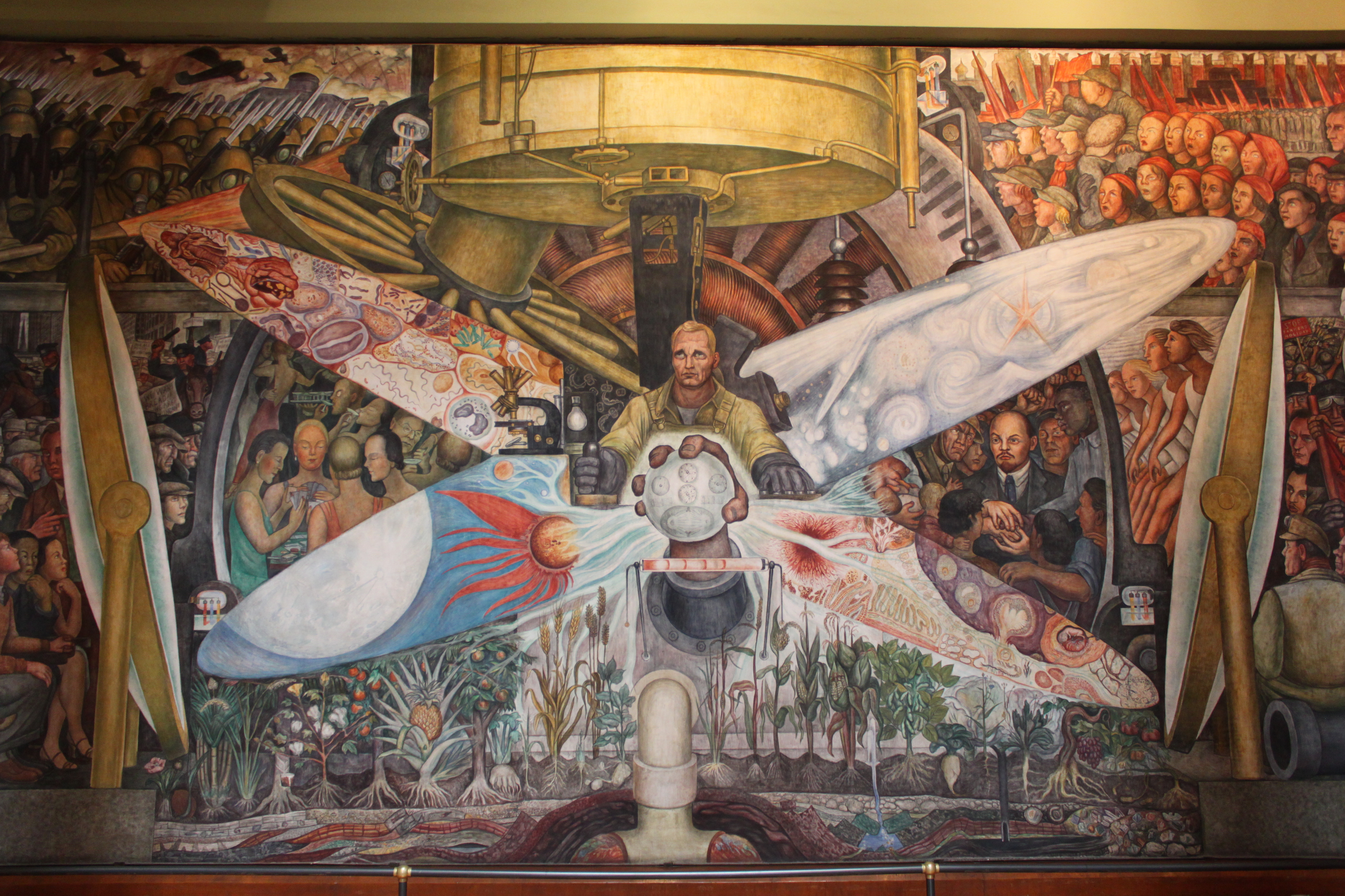 Mural que se encuentra en el vestíbulo del Palacio de Bellas Artes, México Df.